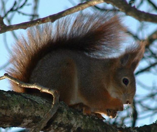 Ekorn.